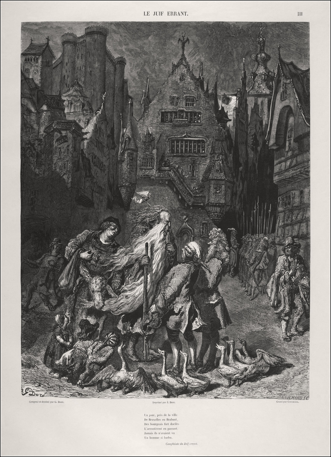 La légende du Juif errant. Compositions et dessins de Gustave Doré. Graves Sur Bois Par F. Rouget, O. Jahyer et J. Gauchard. Michel Lévy, Paris, 1856.